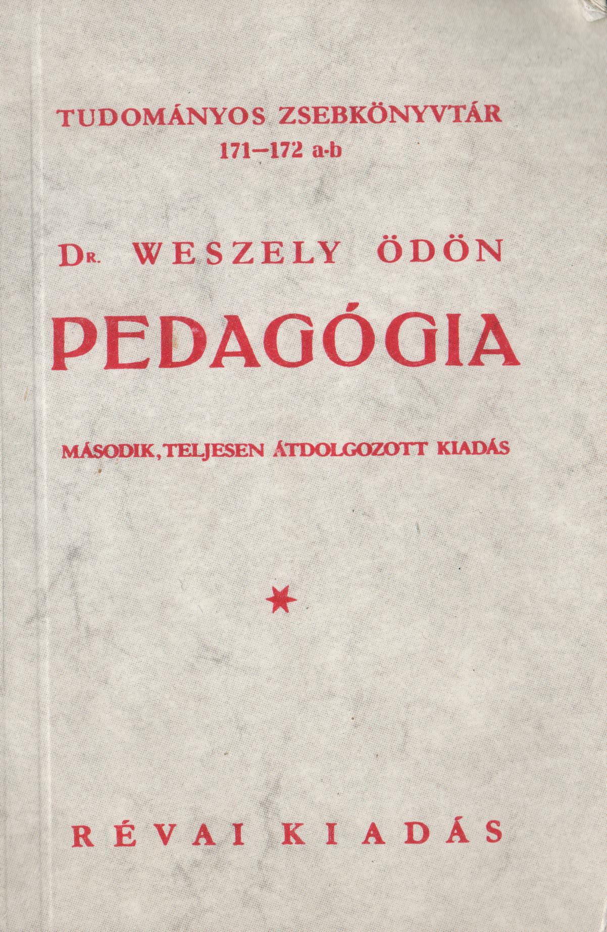 Az adott mű reprint kiadásának borítója.